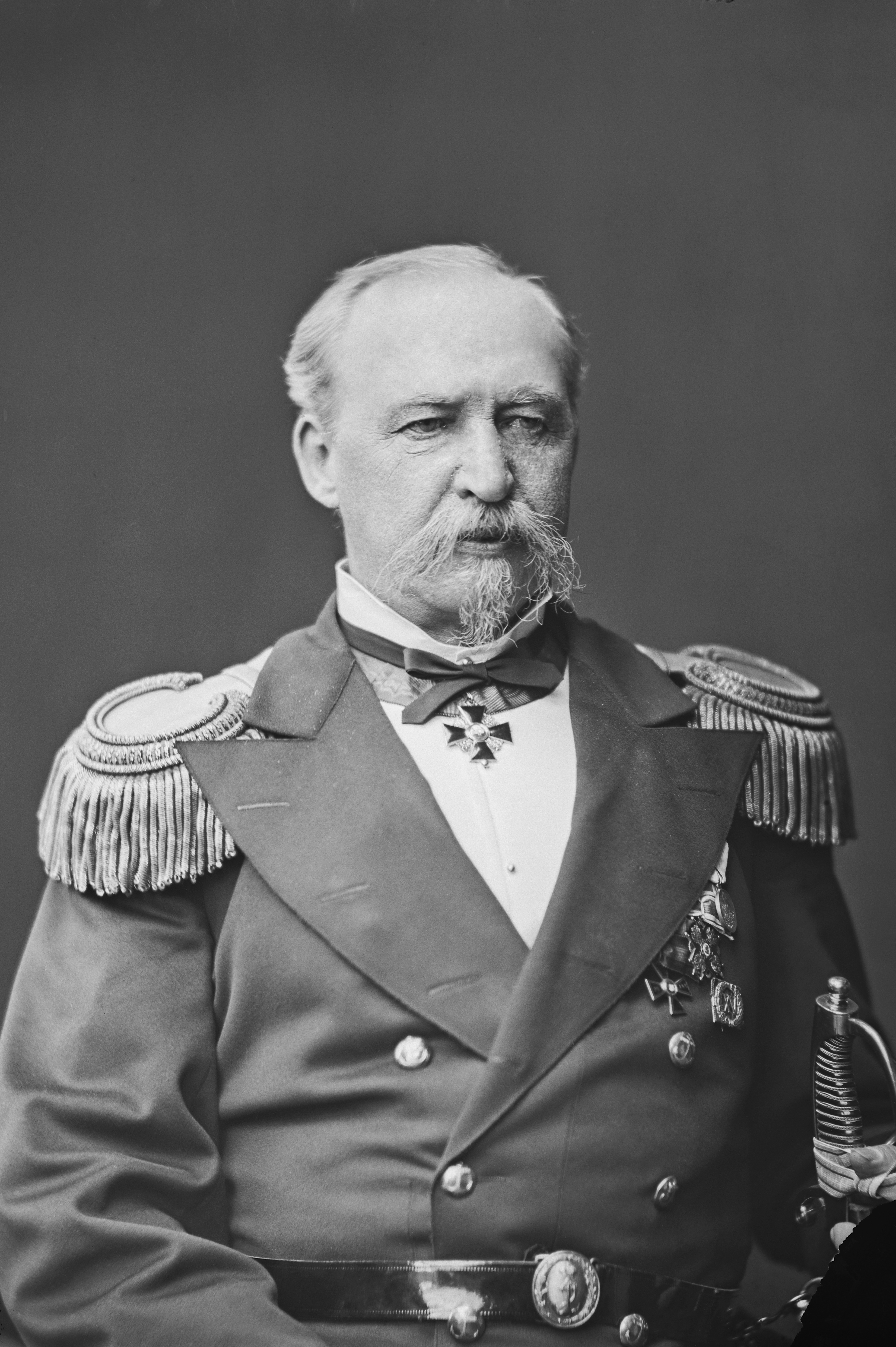 Pysty, mustavalkoinen, retusointi, retusointi korjattu digitoinnin yhteydessä.